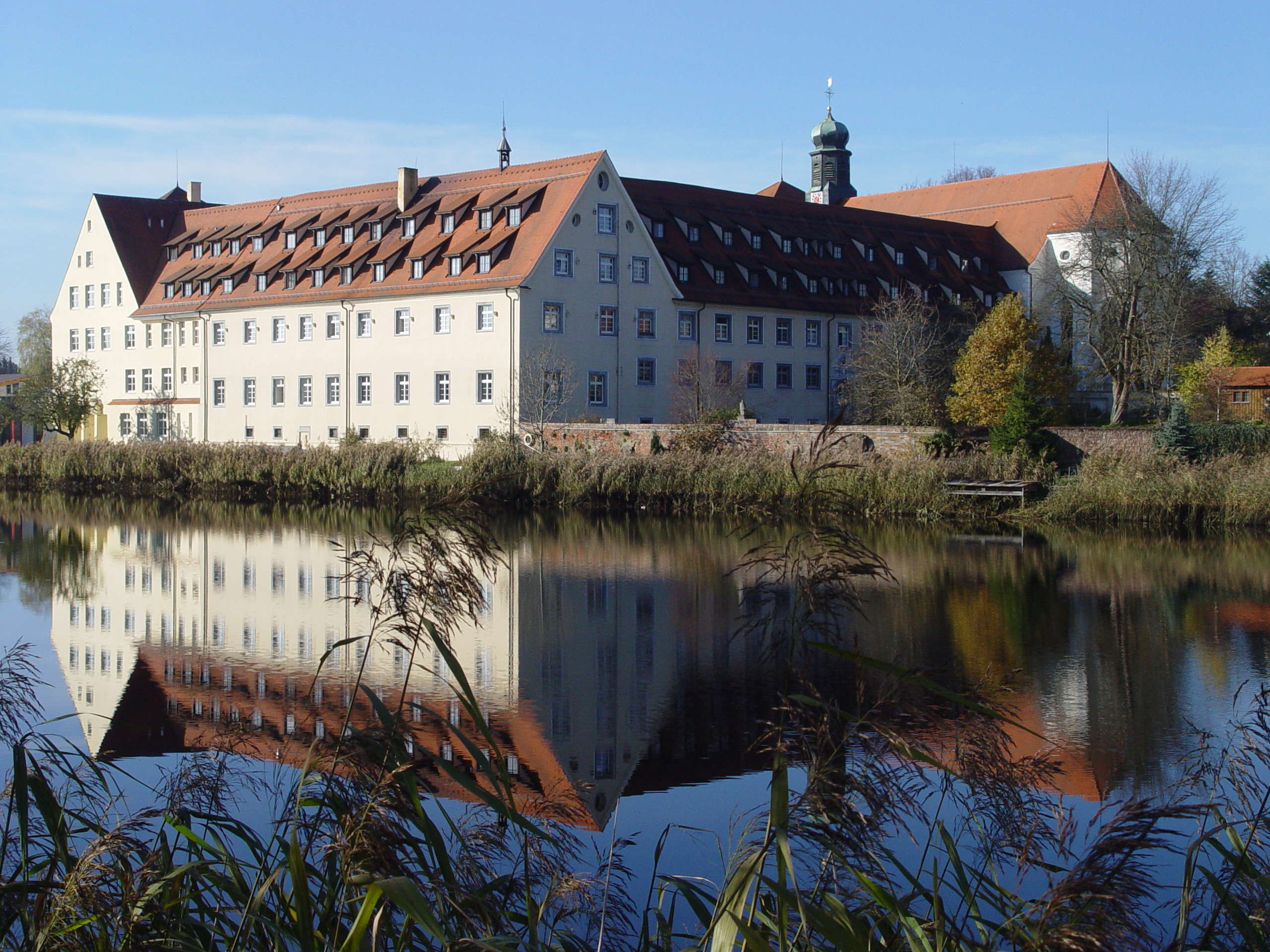 Kloster Wald (Südansicht) in der Gemeinde Wald (Hohenzollern), Deutschland